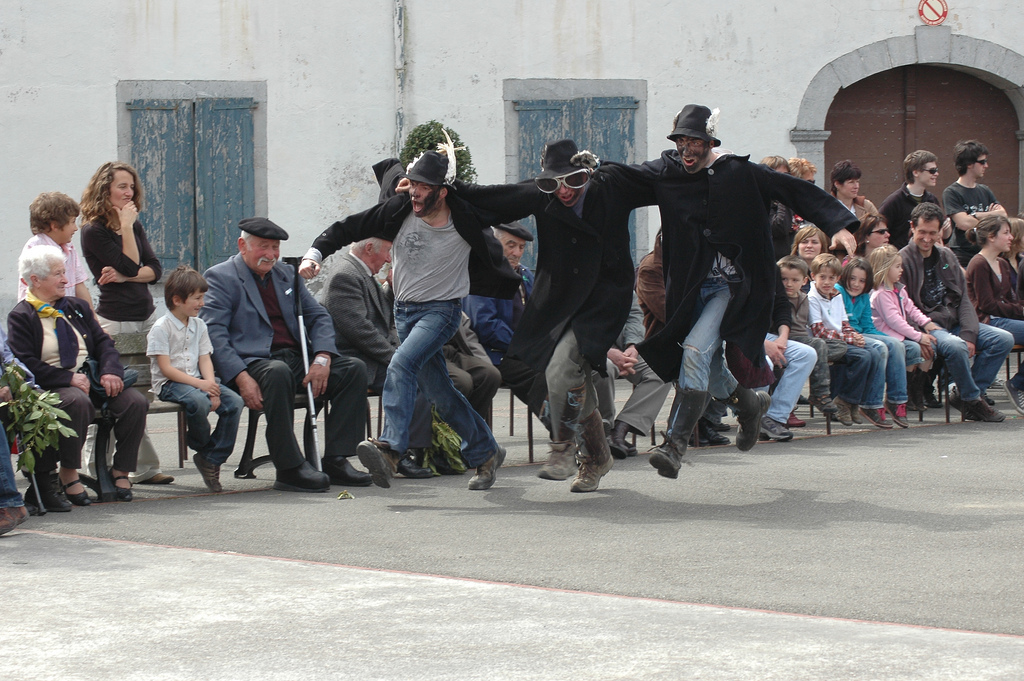 2010eko Larraineko Maskaradak Barkoxen. Kauterak. 2010-03-27